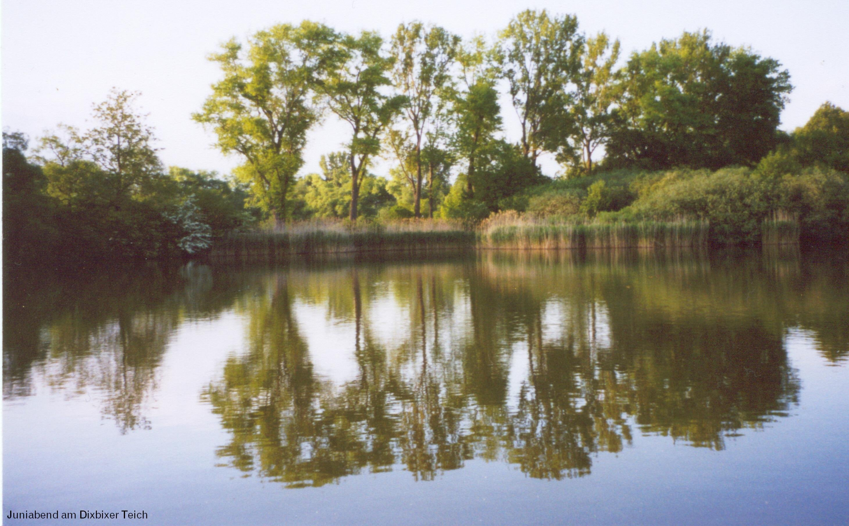 Das Bild zeigt den Dixbixer Teich in Ilmenau.